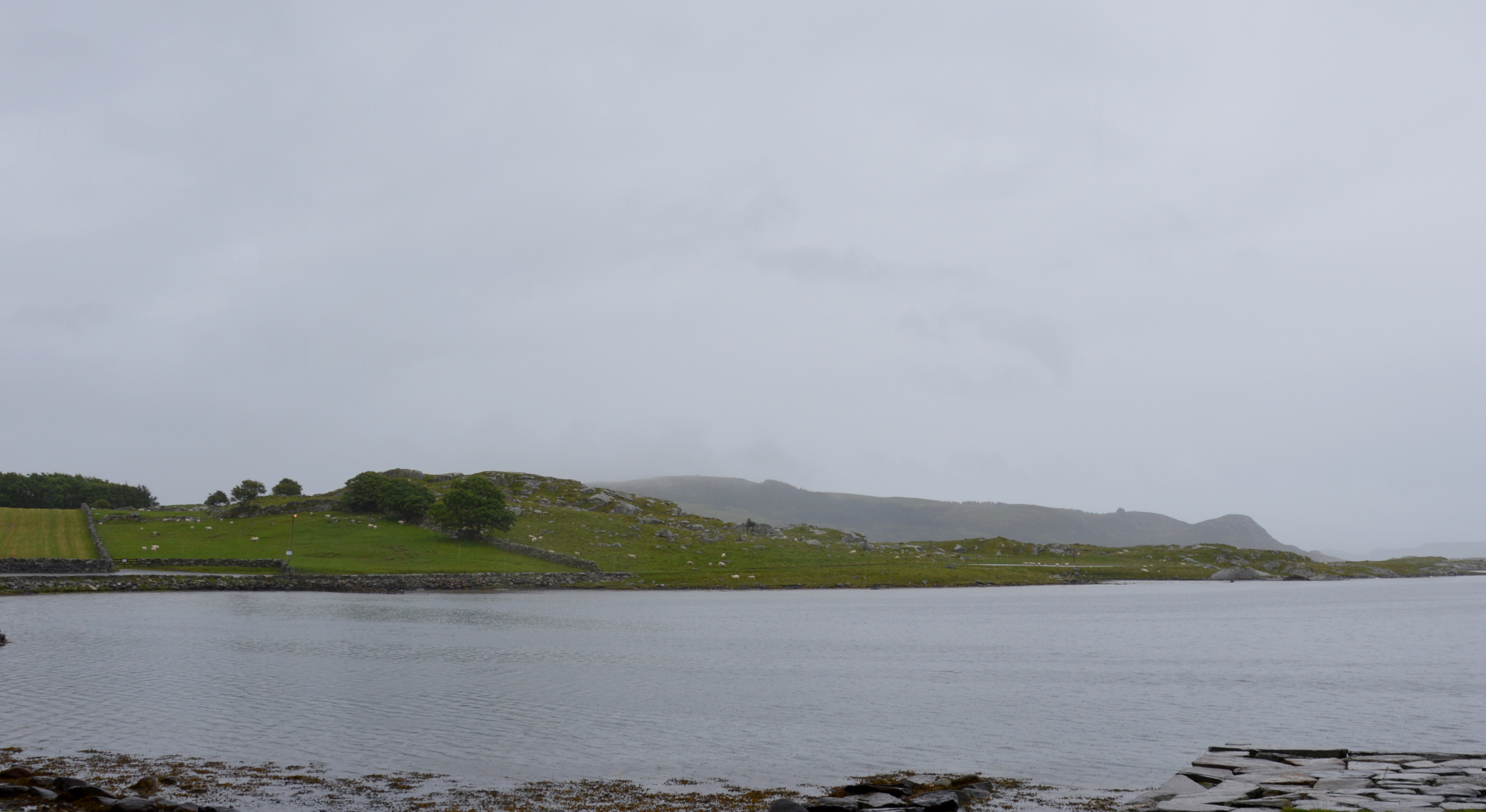 Klosterøy